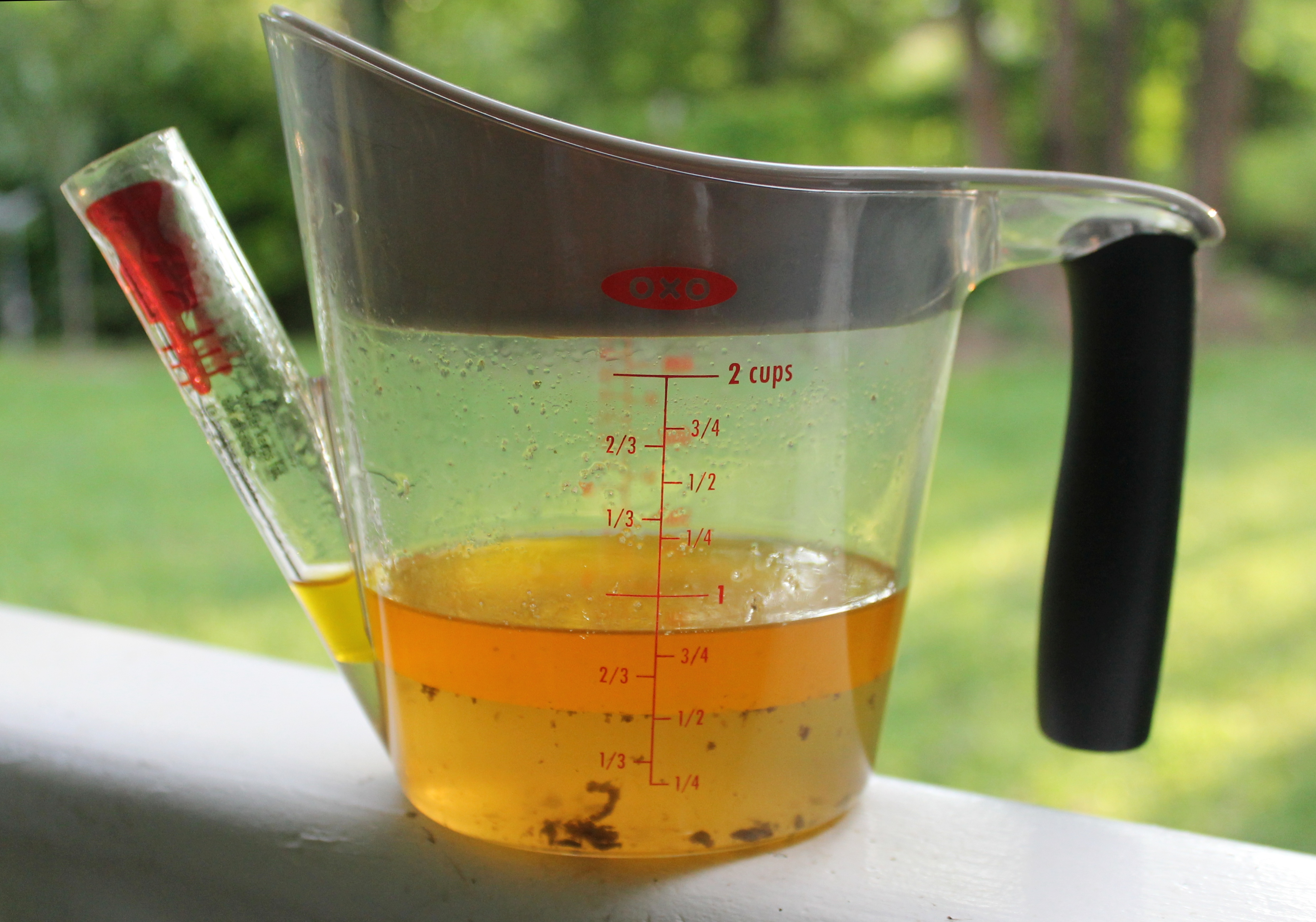 Fetttrenner